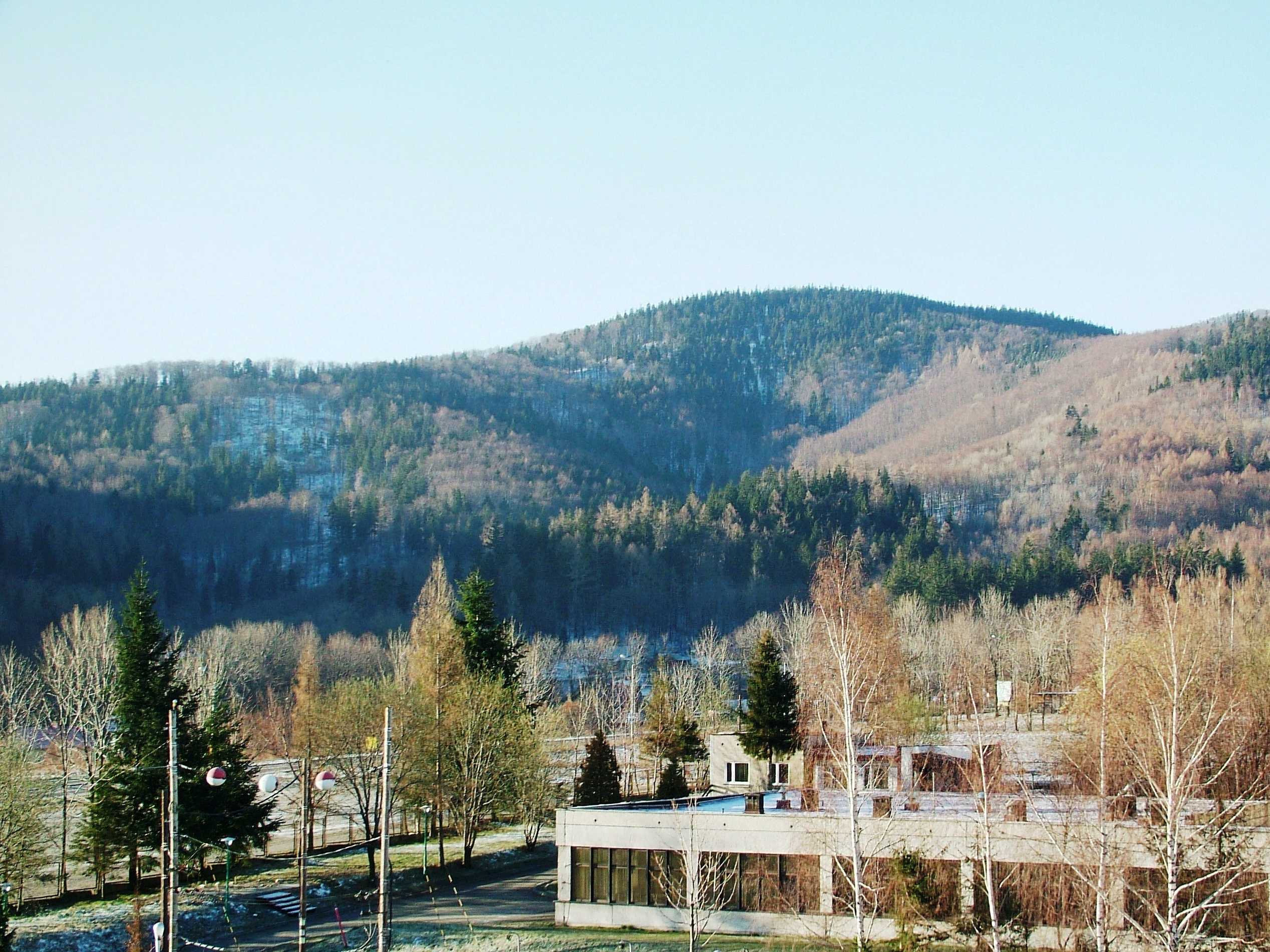 Szczyt Kołowrot w Beskidzie Śląskim